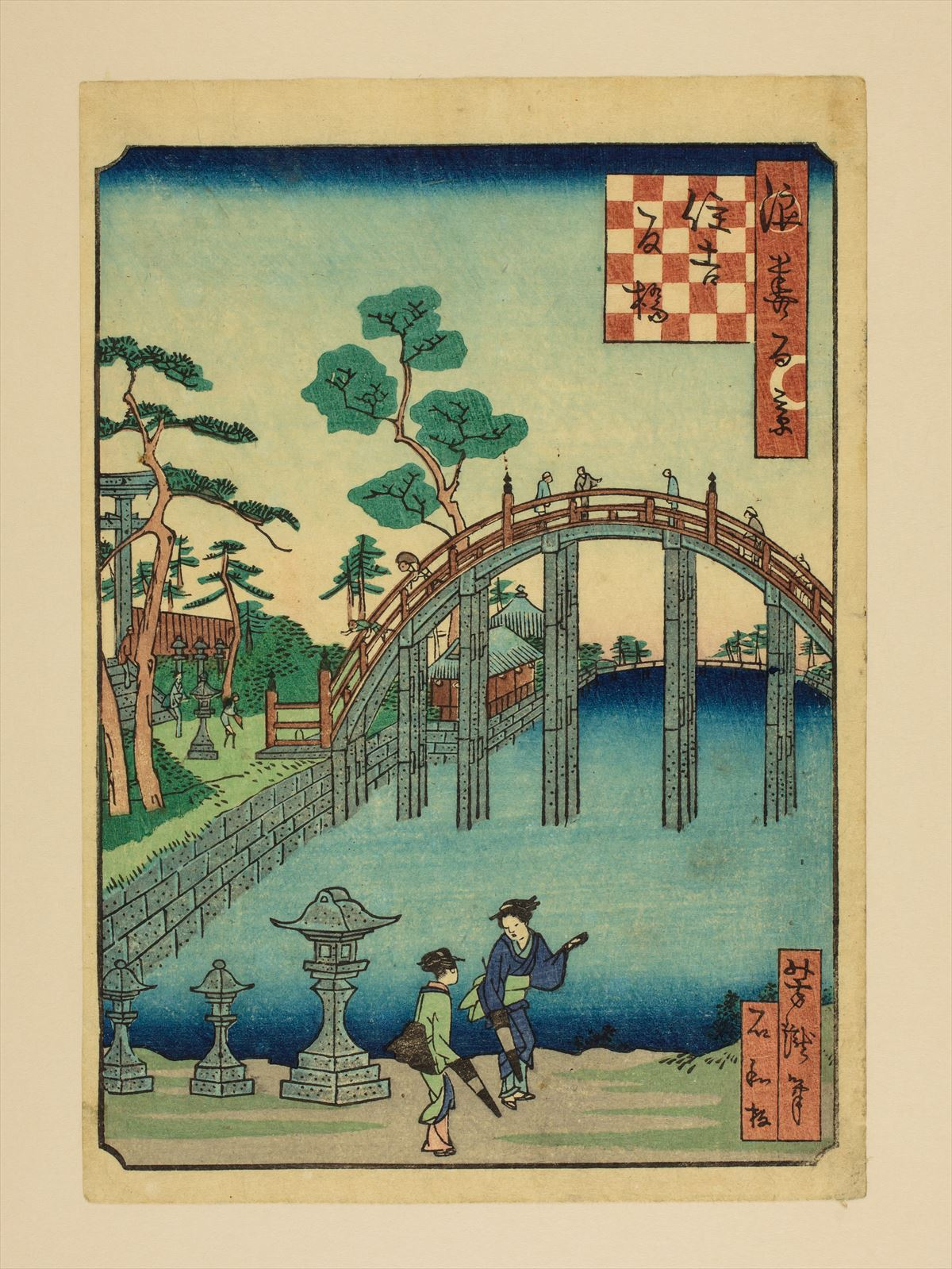 1800年代。里の家芳瀧/画。浪花百景 102枚のうちの1枚。大阪市立中央図書館蔵。